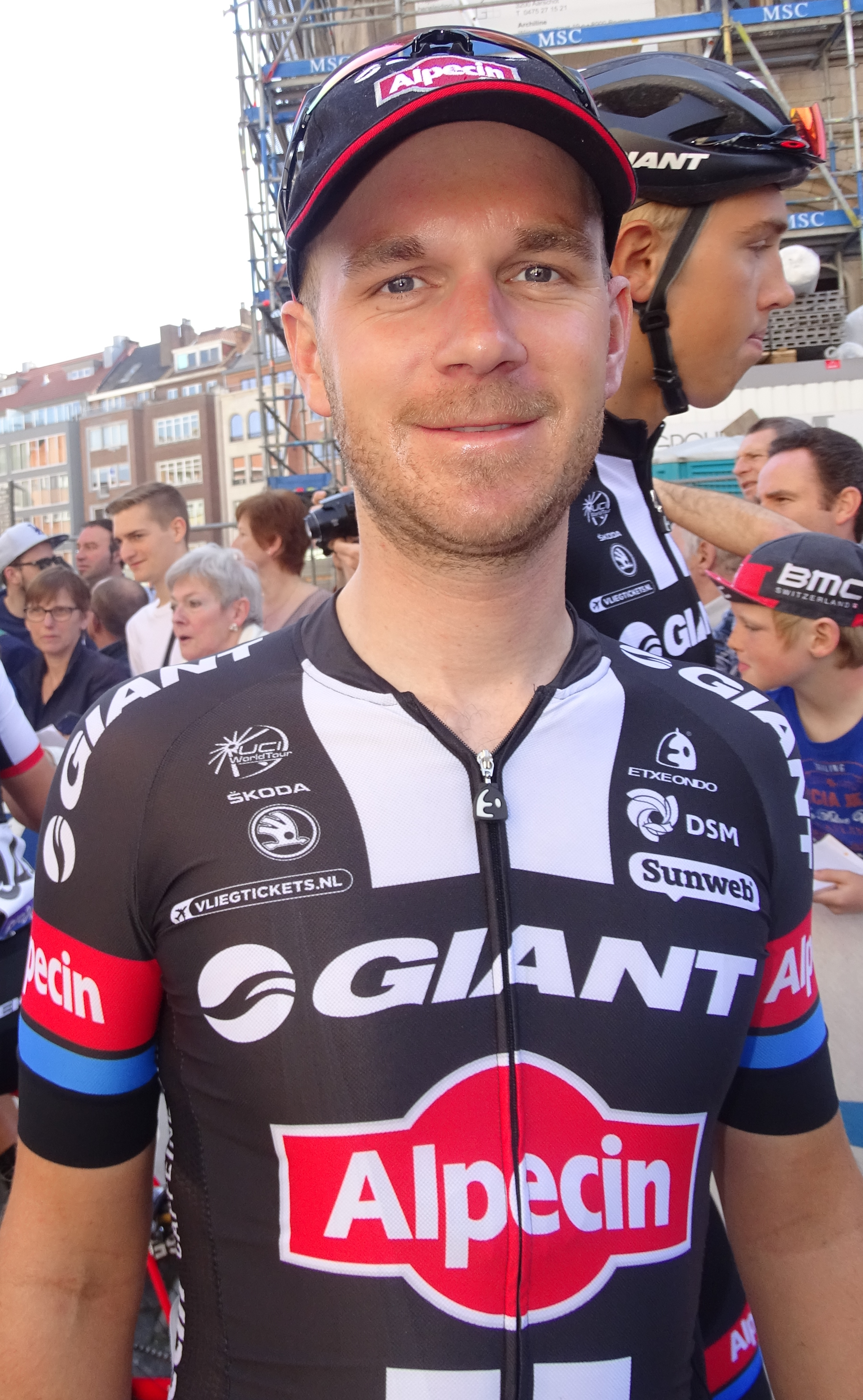 Reportage réalisé le mercredi 15 avril à l'occasion du départ de la Flèche brabançonne 2015 à Louvain, Belgique.